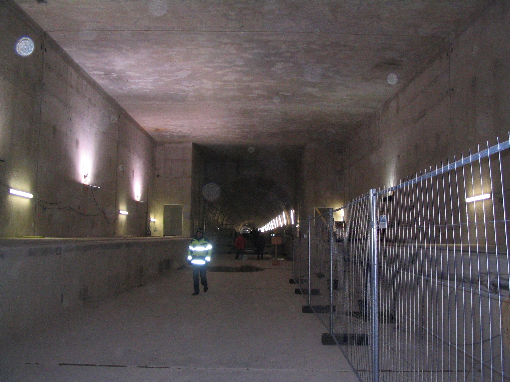 Düsseldorf, Besichtigung des Tunnelneubaus der Wehrhahnlinie im Dezember 2012. Standort Elisabethstraße am Graf-Adolf-Platz (Übergang vom Bahnhof zur Tunnelröre), Blickrichtung Süd (nächster Bahnhof Kirchplatz).